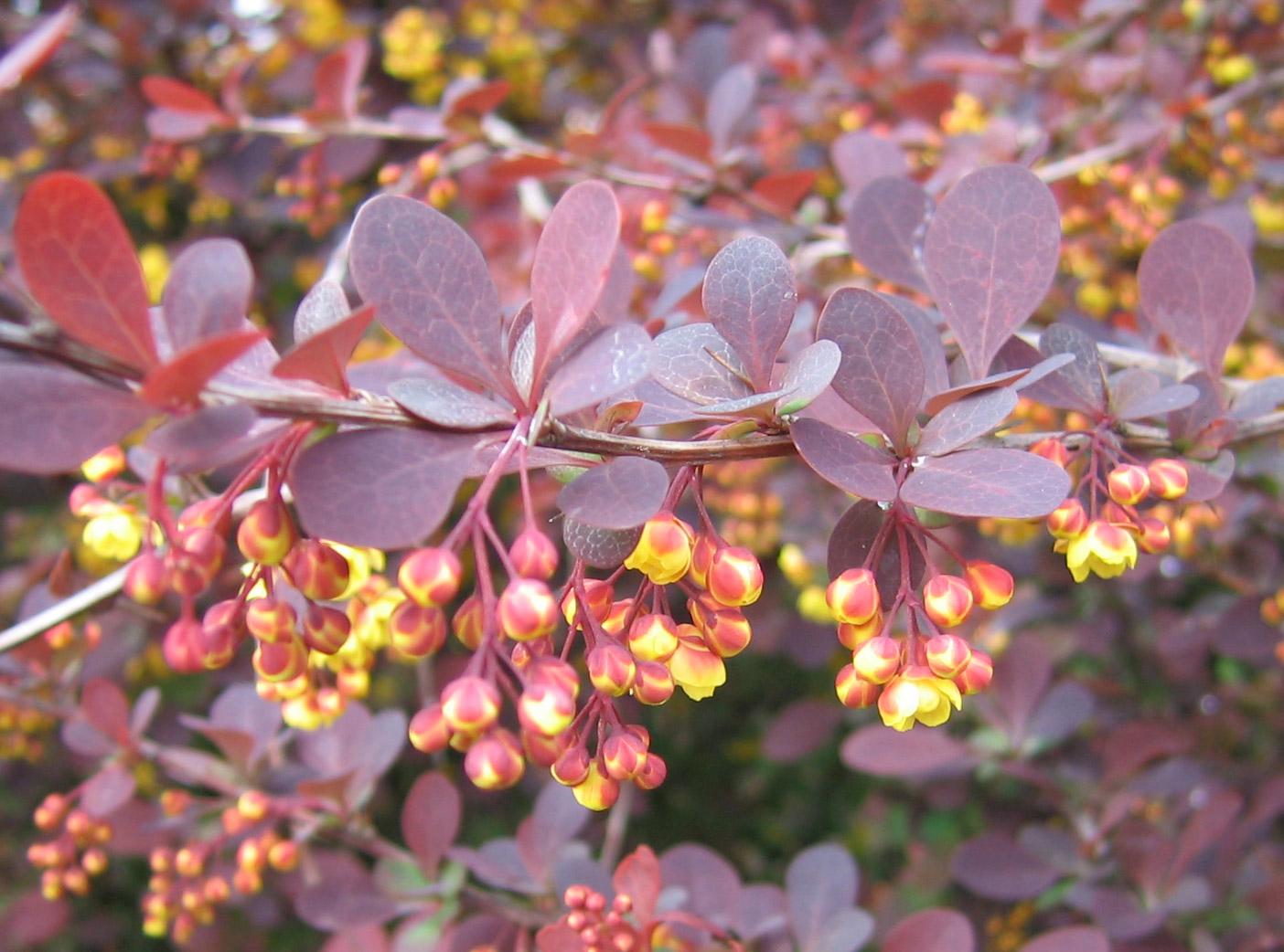 Berberis x Ottawensis Superba